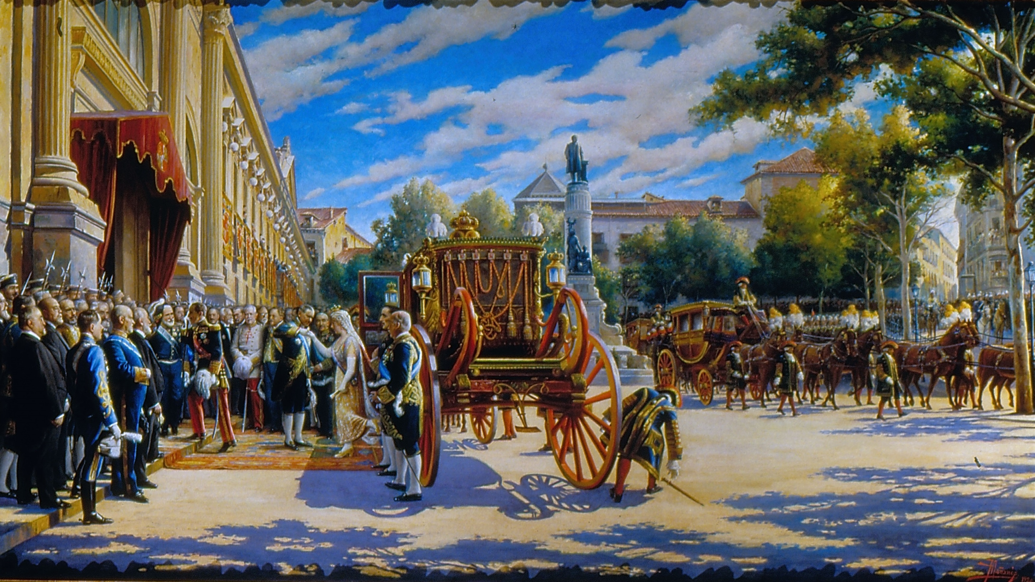 El lienzo representa la apertura de las Cortes Españolas en 1919, durante el reinado de Alfonso XIII (1886-1941). La escena muestra el aspecto que tenía la Plaza de la Marina Española el día 24 de junio de 1919 con motivo de la apertura de las Sesiones de la XXXVIII Legislatura de las Cortes. Antonio Maura, presidente del Gobierno, aparece recibiendo a los reyes Alfonso XIII y Victoria Eugenia de Battemberg, que bajan de la carroza.